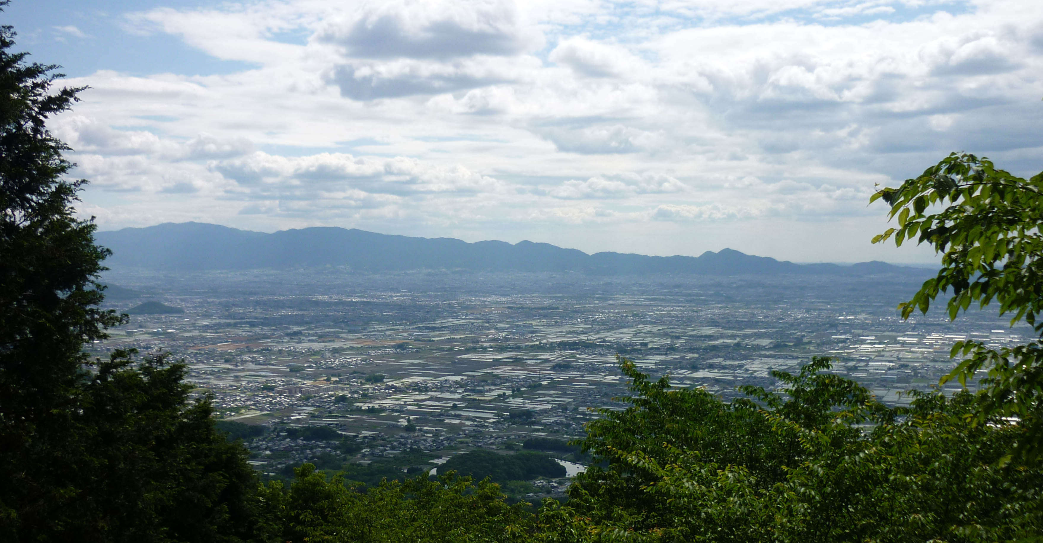 本丸からの眺望